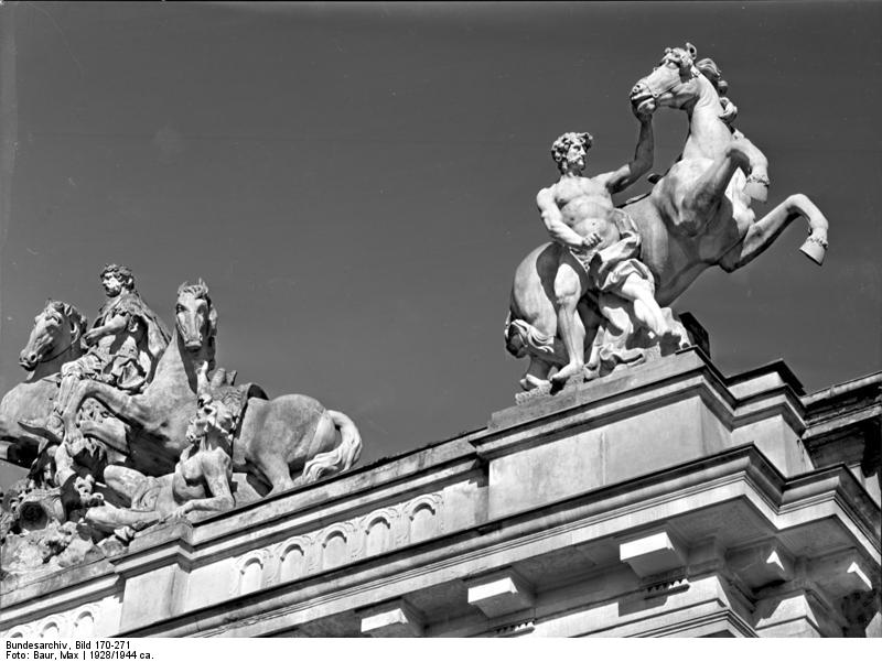 Potsdam.- Marstall